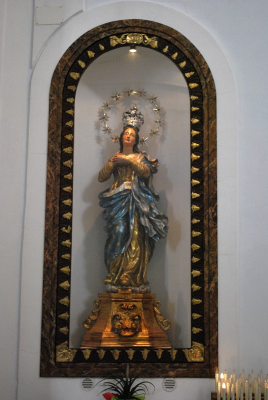 Simulacro dell'Immmacolata, opera di Ingrassia. È stata restaurata almeno 3 volte dal 1912 al 2013. Chiesa di San Francesco d'Assisi, Alcamo.